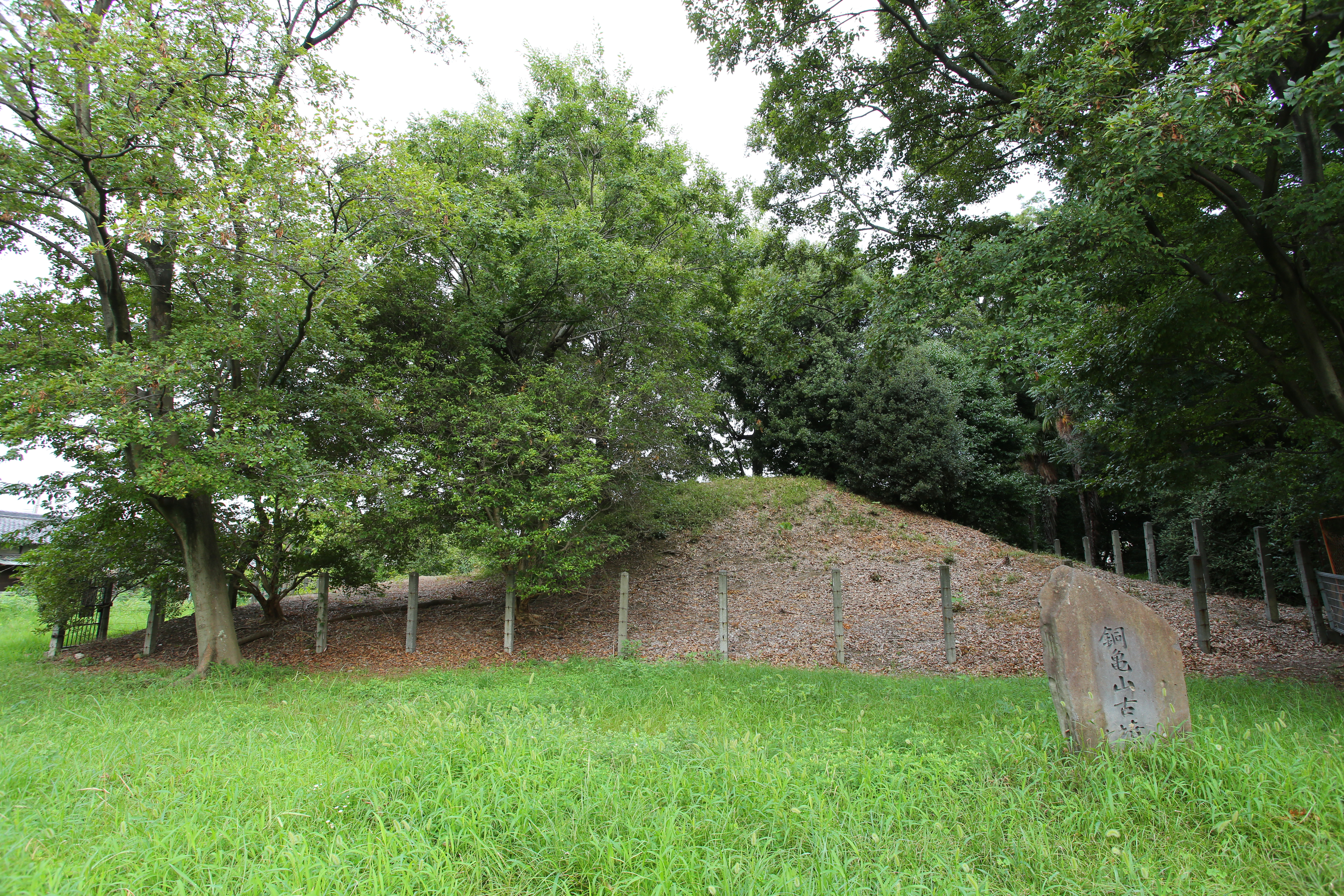 銅亀山古墳（南東から）